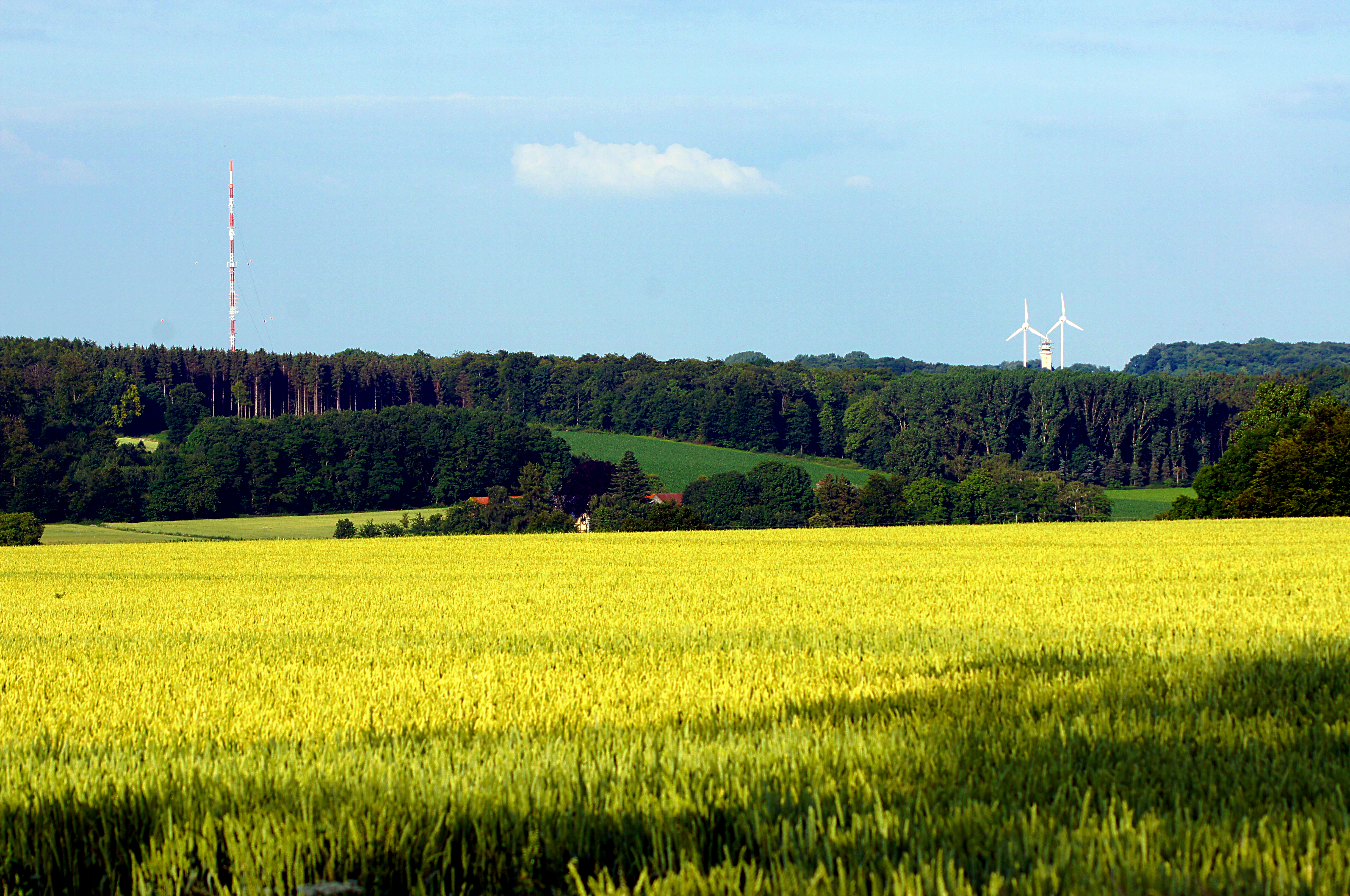 Landschaft in den Baumbergen. Links der Sender Nottuln des WDR, rechts - scheinbar eingerahmt von zwei Windrädern - der Longinusturm auf dem 187 m hohen Westerberg, dem höchsten Punkt des Münsterlandes.